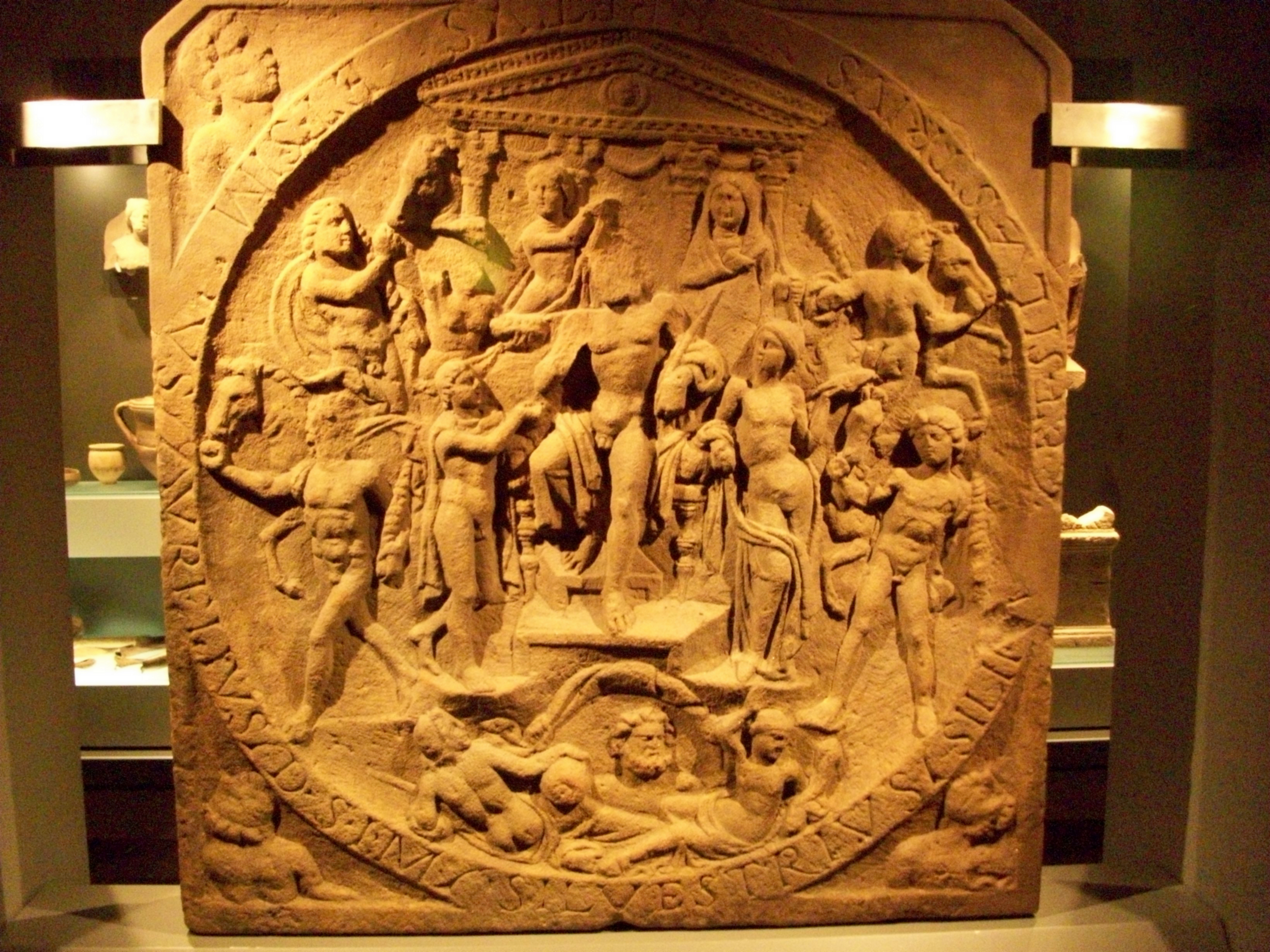 Stein des Dieburger Mithräum (eines von zwei nachgewiesenen Kultstätten (1926 wiederentdeckt) in der Stadt) und eines der Kernstücke des dortigen Museums "Schloss Fechenbach" (siehe auch Dieburger Mithräum)